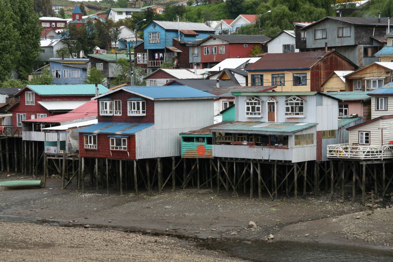 Palafitos en Castro, isla de Chiloé, Chile